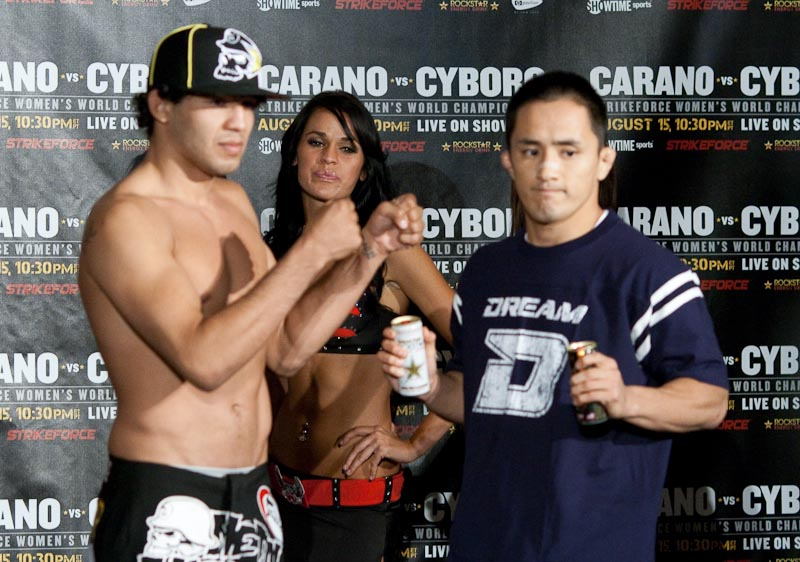 Гилберт Мелендес и Мицухиро Исида на взвешивании